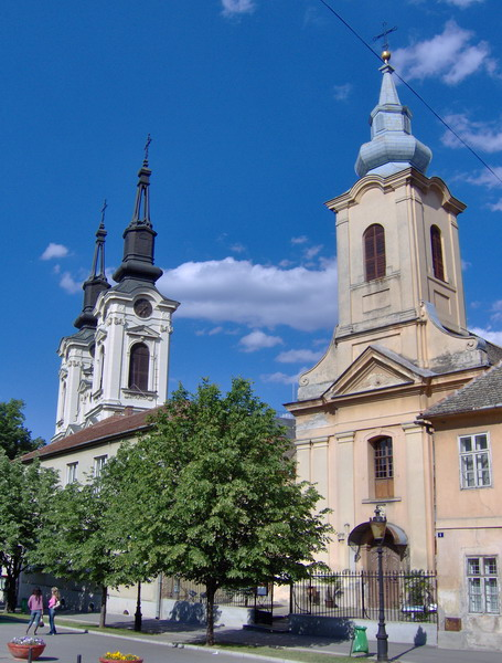 Orthodox and Catholic churches in Sremski Karlovci, Serbia, Vojvodina/Les églises orthodoxe et catholique à Sremski Karlovci, Voïvodine, Serbie